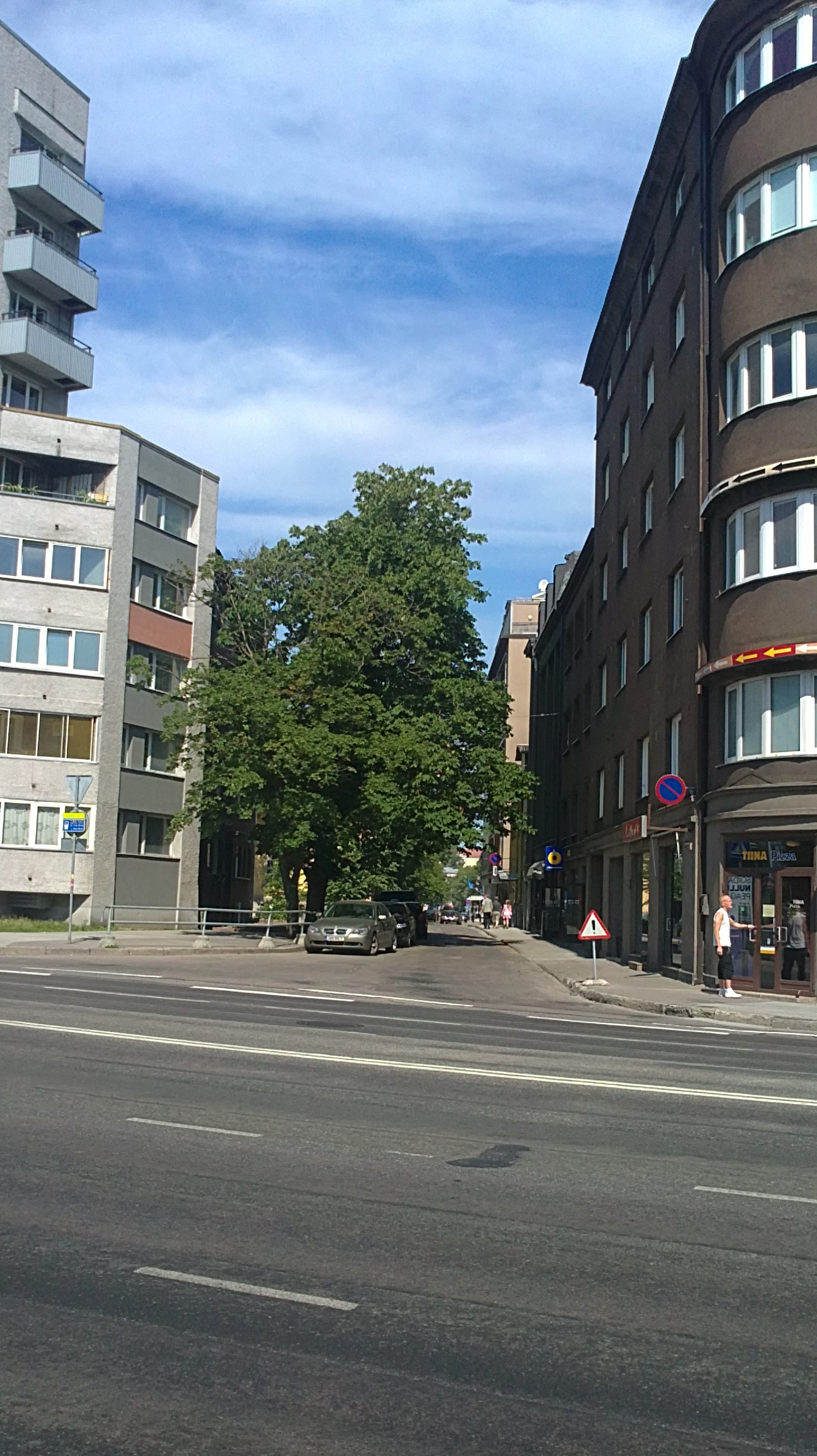 Tallinn Tallinna kesklinna Kentmanni tänav, vaade Liivalaia tänavalt